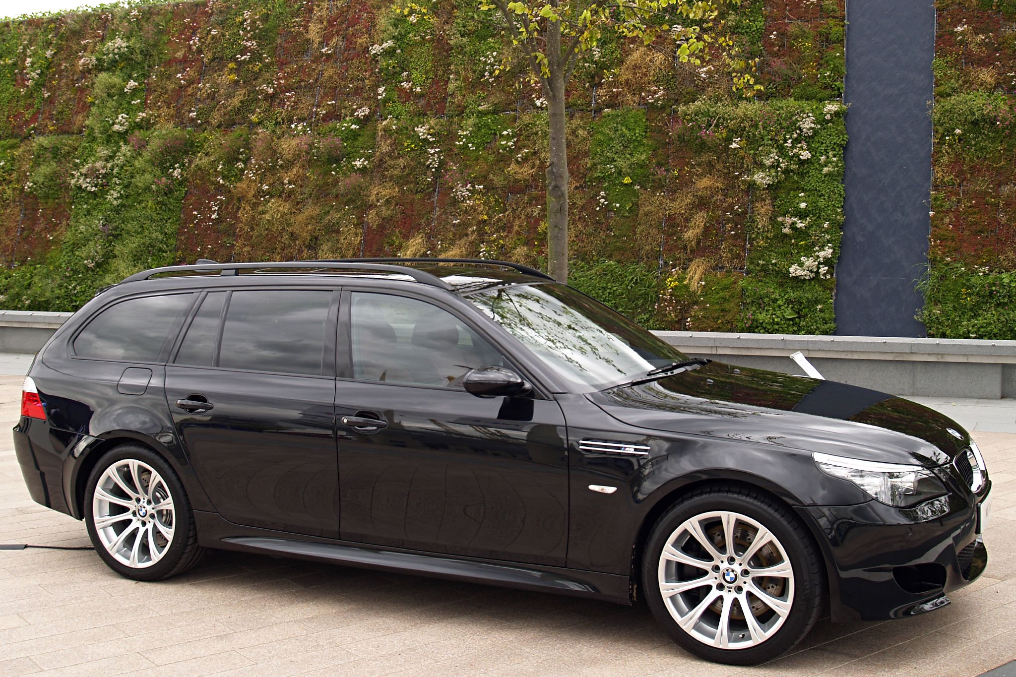 BMW POWER JULY 07 Peninsula Square O2